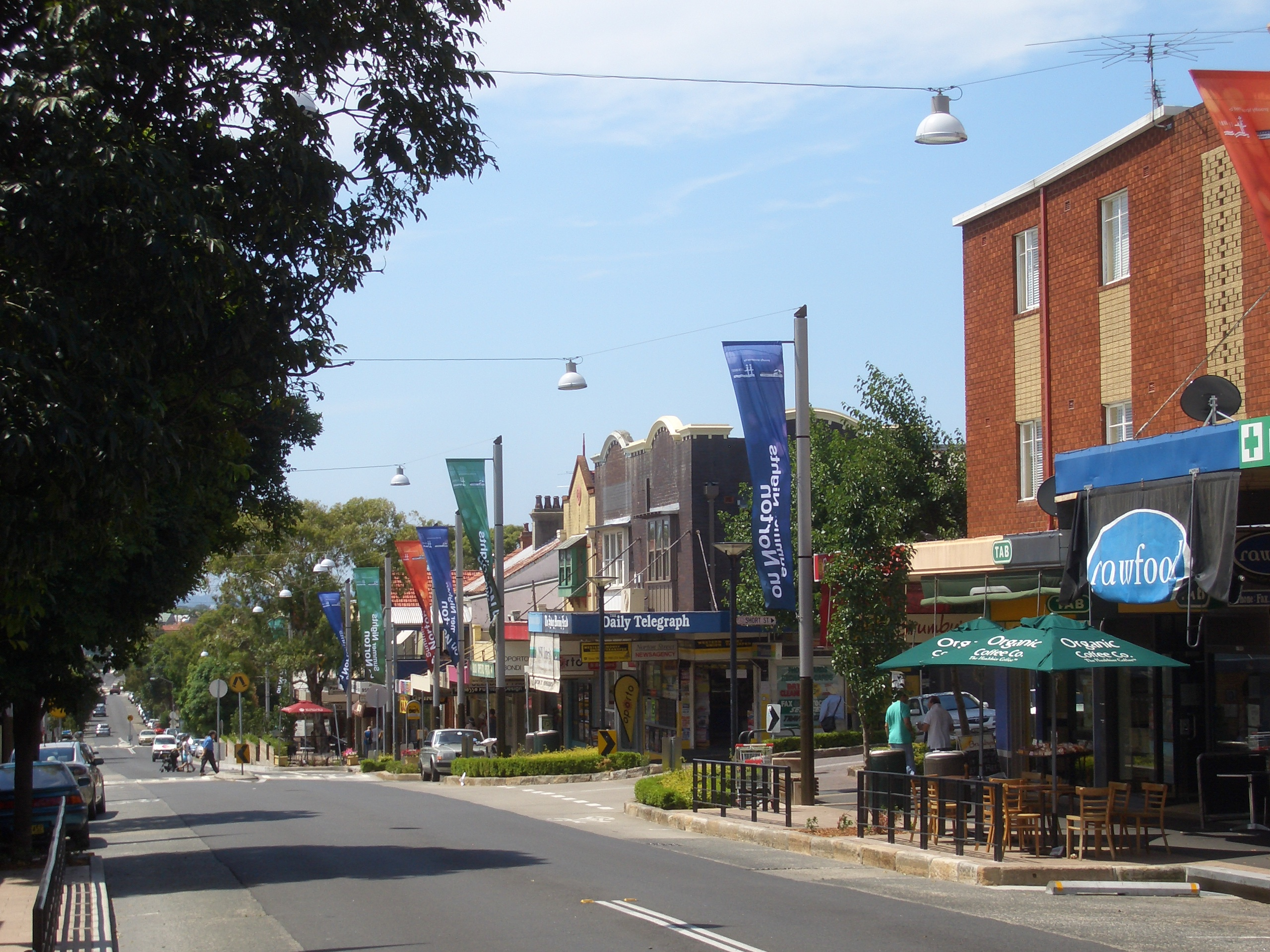 Leichhardt, Norton Street